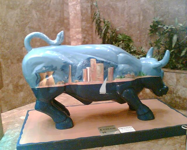 השור של חילן טק. צילם דוד שי.